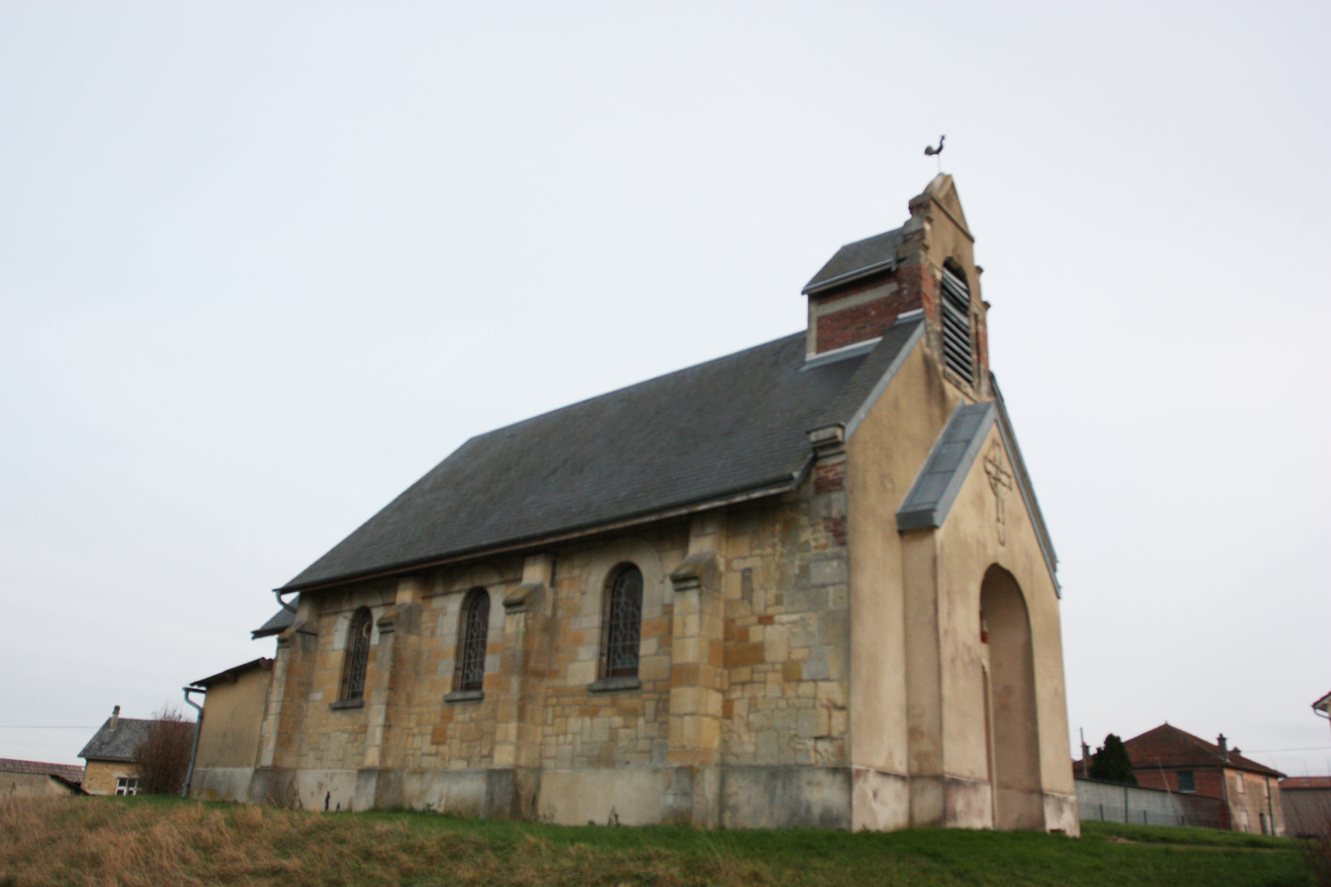 Village Ardennais